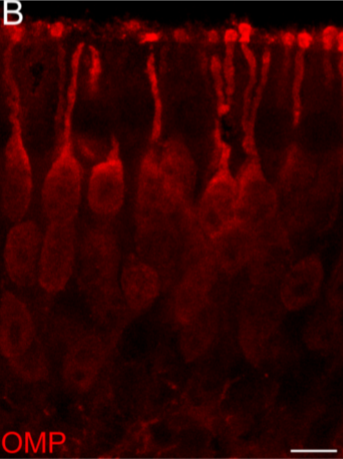 Fig. 4. Marcadores para células de sostén. Epitelio olfativo. La tinción con OMP sólo tiñe neuronas en citoplasma, dendritas y axones. Núcleos ausentes se observan como ovoides oscuros negro/gris. Lumen de la fosa nasal arriba. Barra de escala= 5 μm